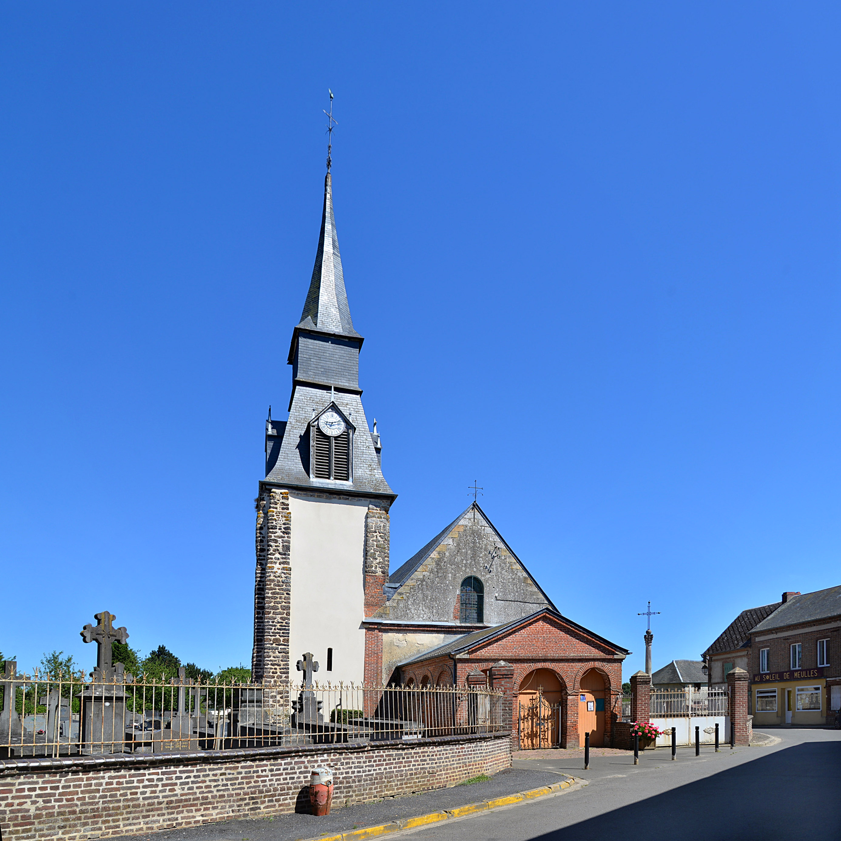 Livarot-Pays-d'Auge (Meulles - Calvados)